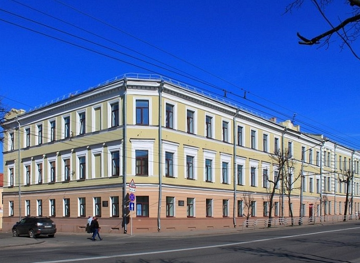 жаночая гімназія (Першамайская 24)